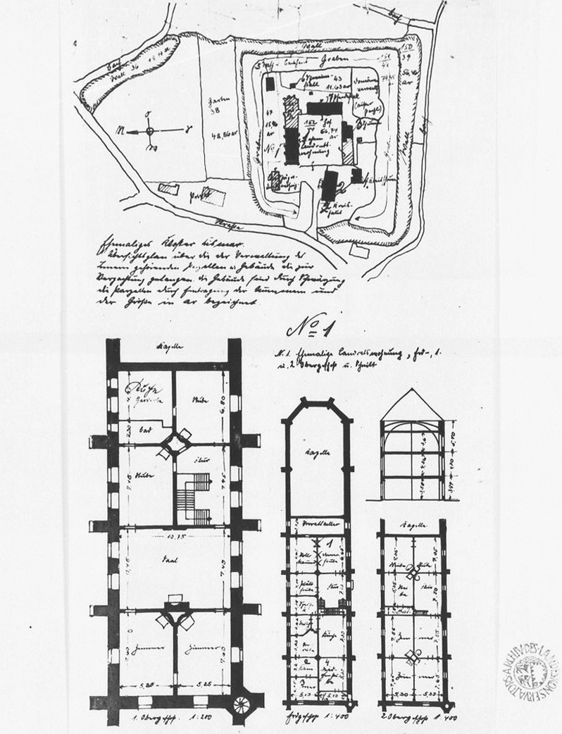 Lageplan und Grundrisse des ehemaligen Benediktiner-Klosters in Cismar